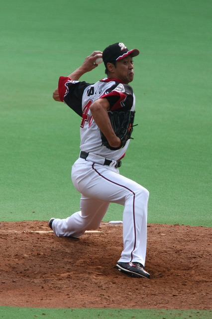 2009年 日本プロ野球 千葉ロッテマリーンズ 高木晃次投手